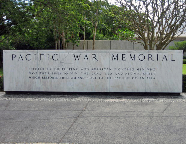 Pacific War Memorial at Corregidor